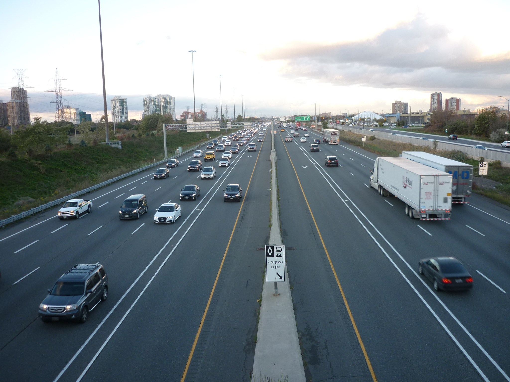 Вигляд на автомагістраль HWY403 з моста Confederation. Смуги HOV відділені подвійною суцільною лінією.